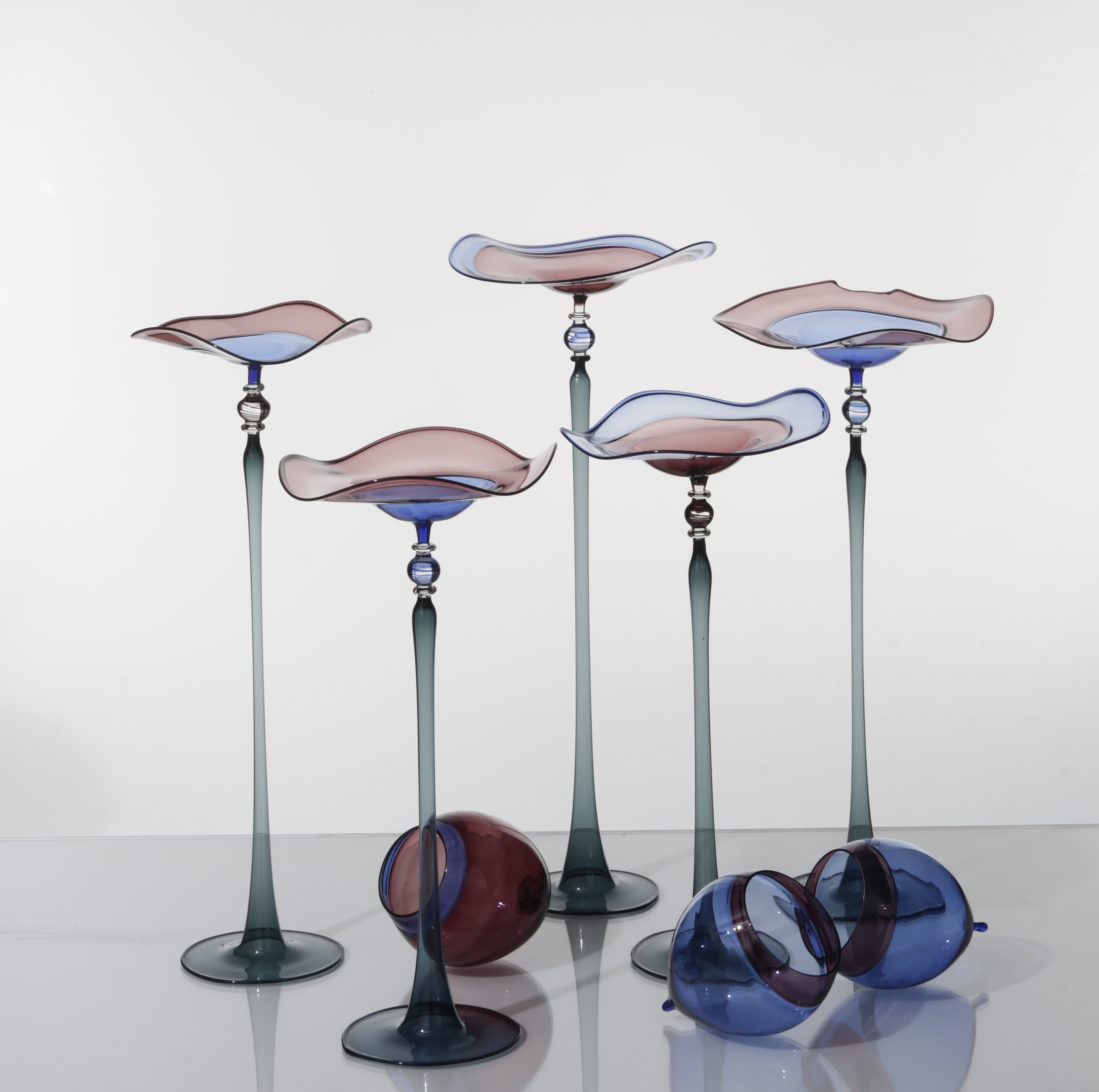 Glaskunstobjekt “Wasserlilien mit Knospen”: Glaskelche und Glaskugelvasen, Künstlerin Kerstin Müllerperth